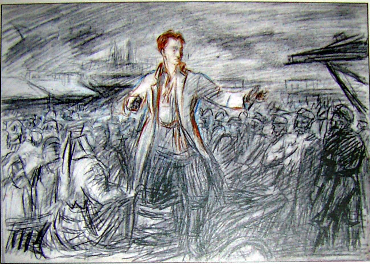 К. Каліноўскі. Эскіз да карціны